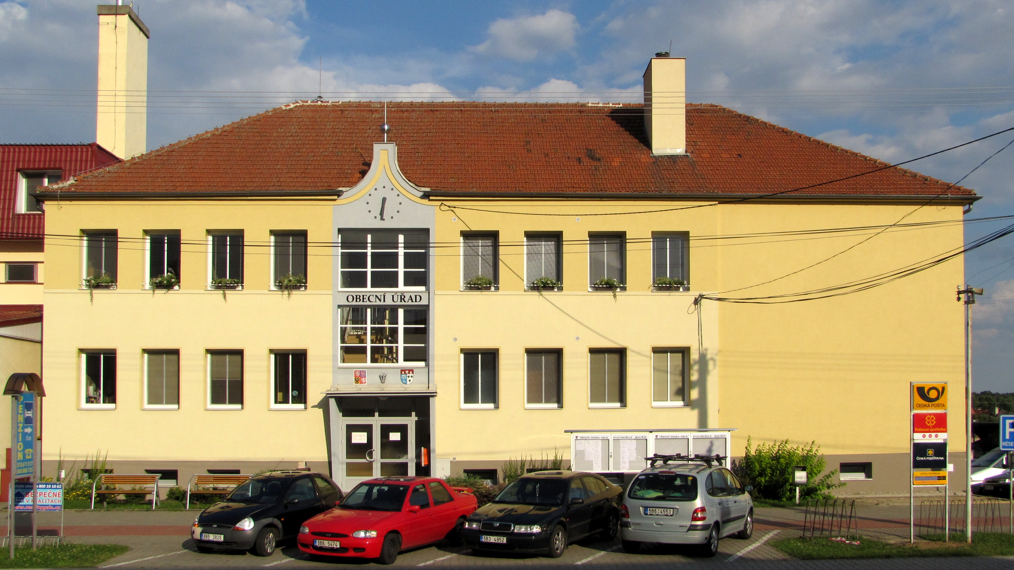 Obecní úřad ve Svatobořicích-Mistříně